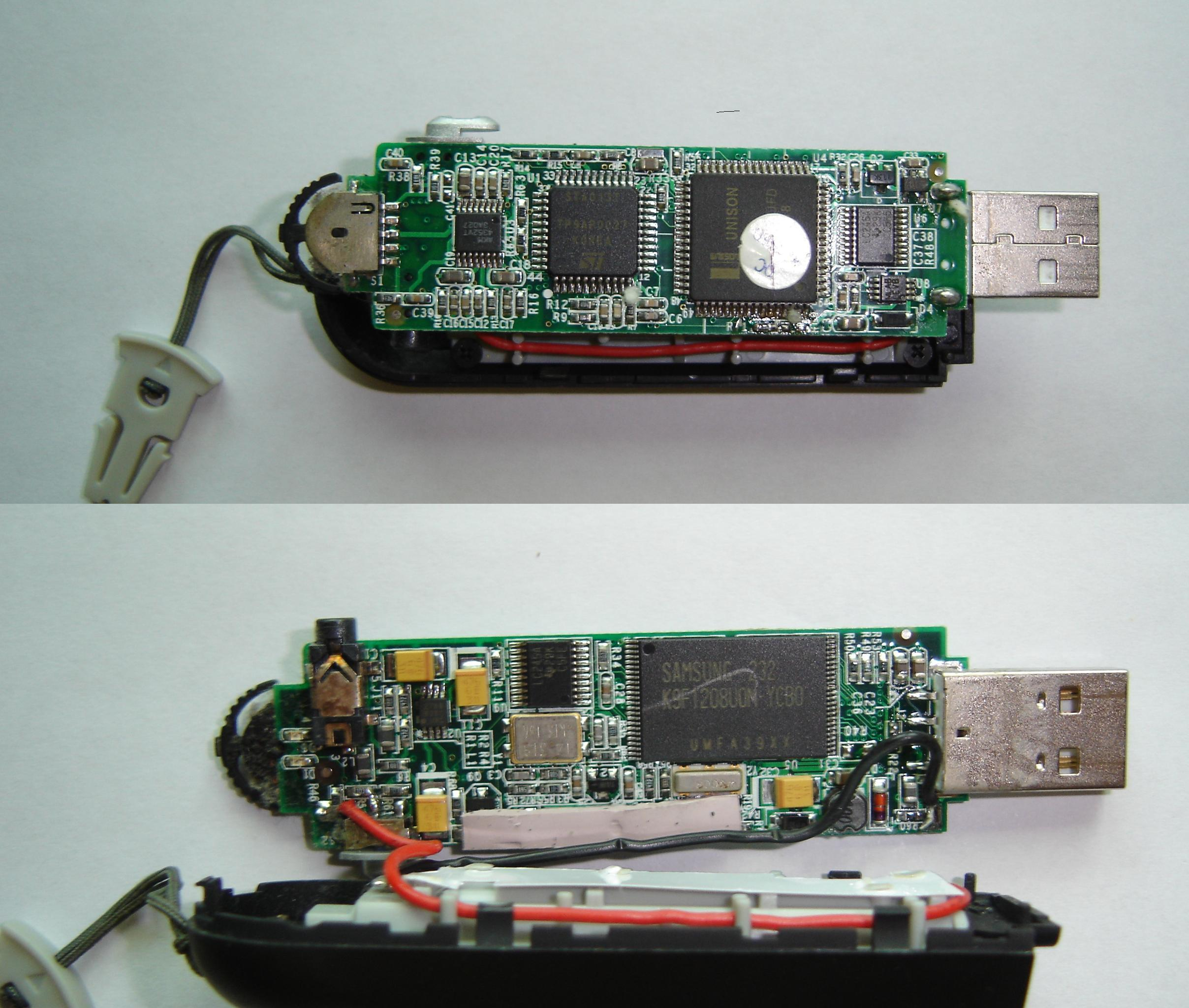 U盘的内部结构